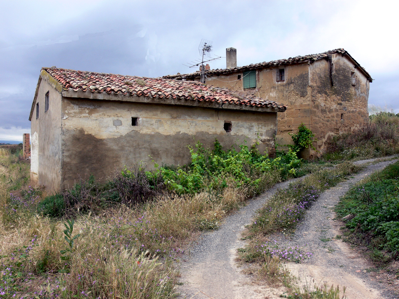 Cuzcurritilla, aldea de Rodezno en La Rioja (España)